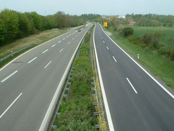 German federal road B30 near Achstetten